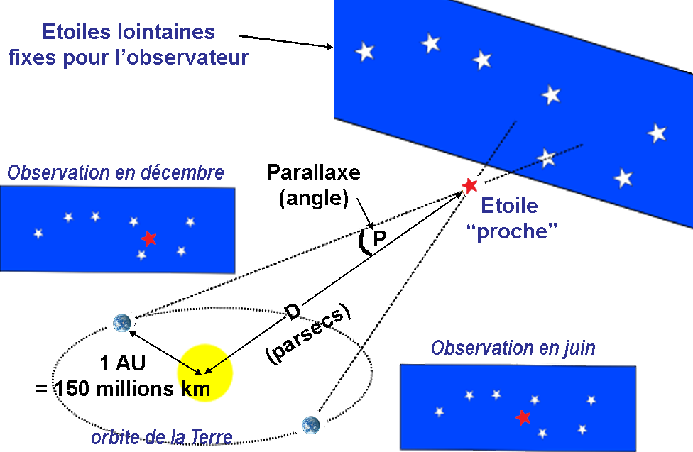 Schéma parallaxe avec légende en français